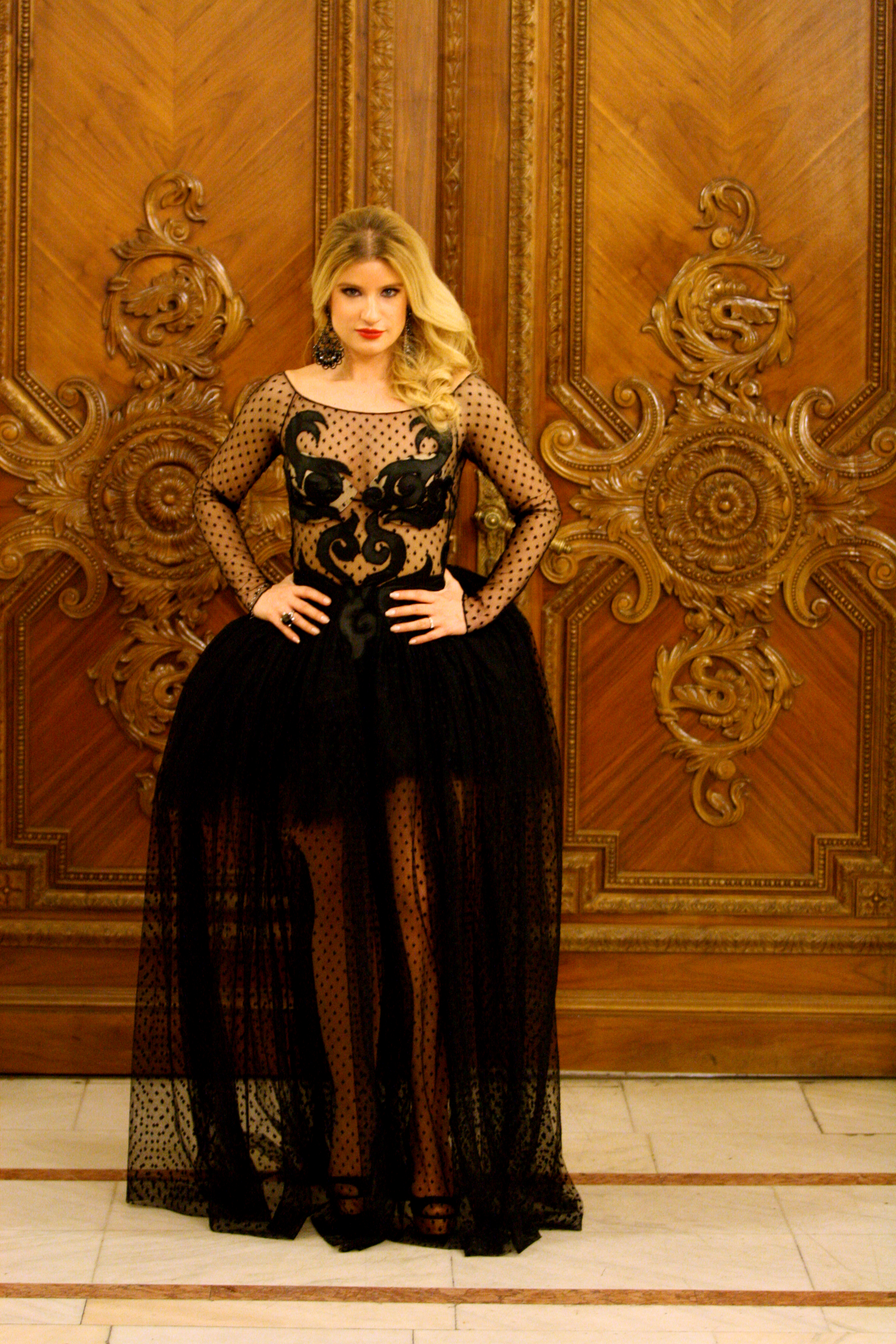 Rochie Doina Levintza, model poeta Bianca Beatrice Michi